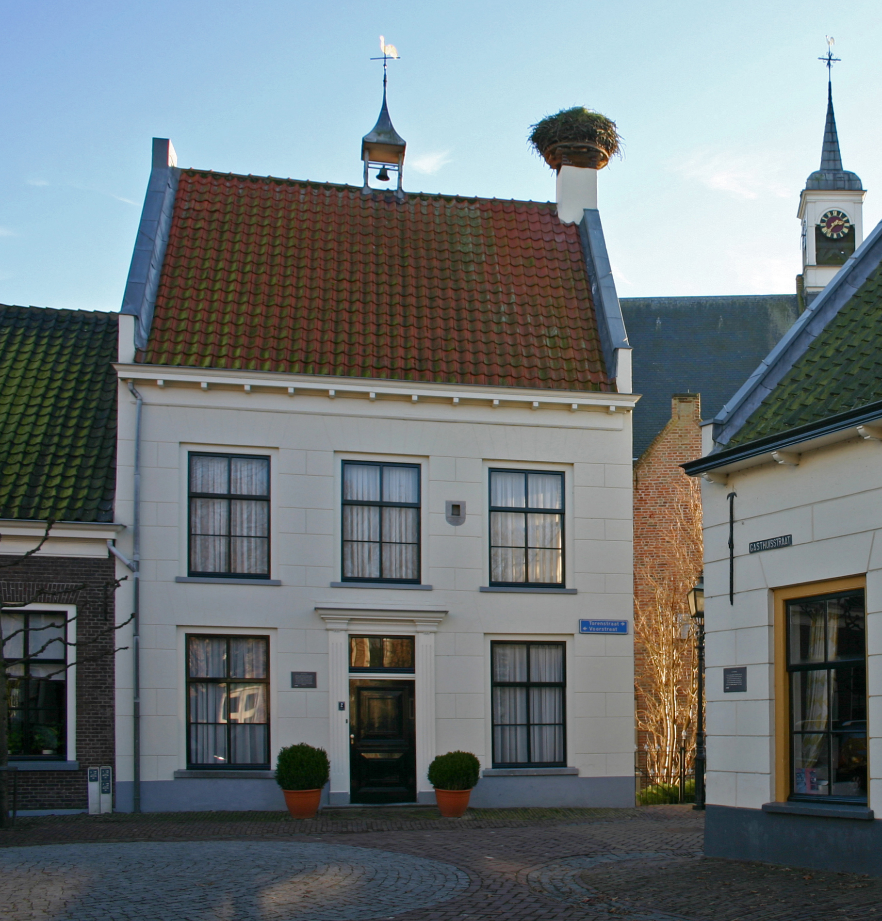 Voormalig stadhuis van Heukelum